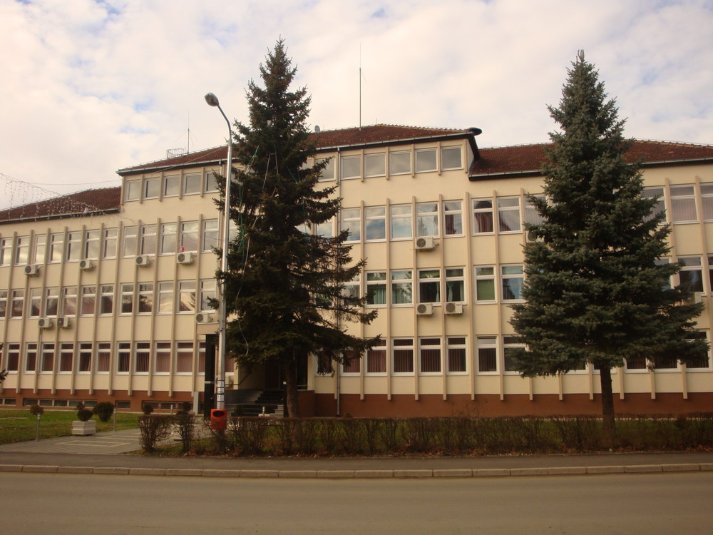 Зграда_општине_(Челинац)